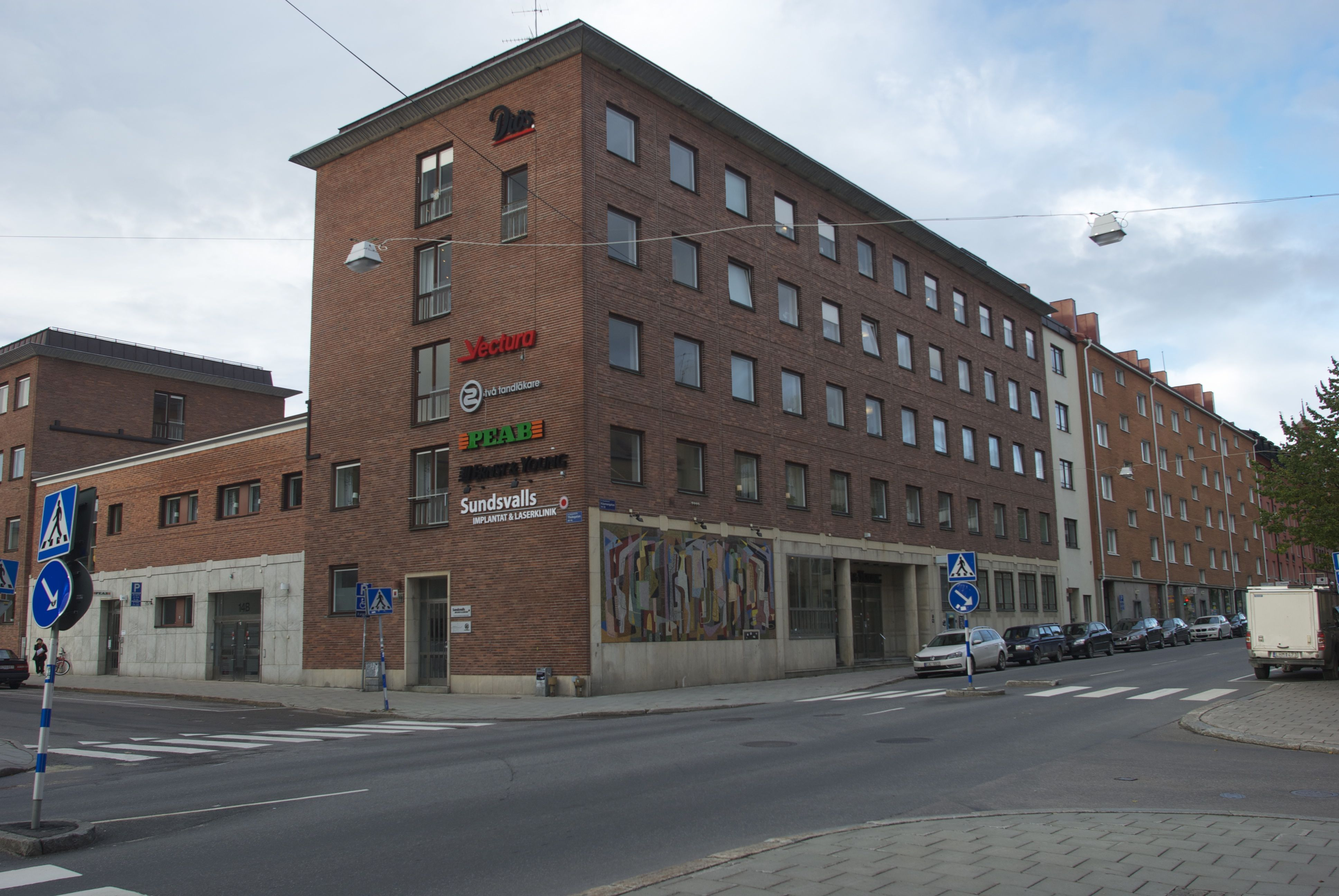 Posthuset, Sundsvall (Borgmästaren 10)